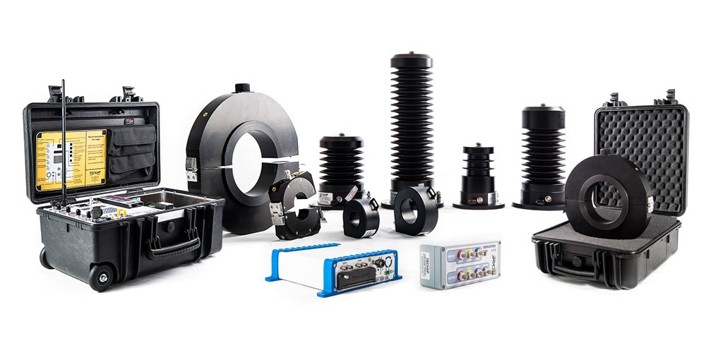 Линейка оборудования для мониторинга силового оборудования методом выявления и анализа частичного разряда.